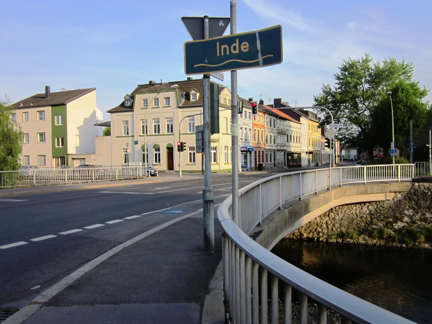 Brücke über die Inde an der Bergrather Straße in der Stadtmitte von Eschweiler in der Städteregion Aachen im westlichen Nordrhein-Westfalen (mit Inde-Schild und Blick Richtung Bergrather Straße/Patternhof)